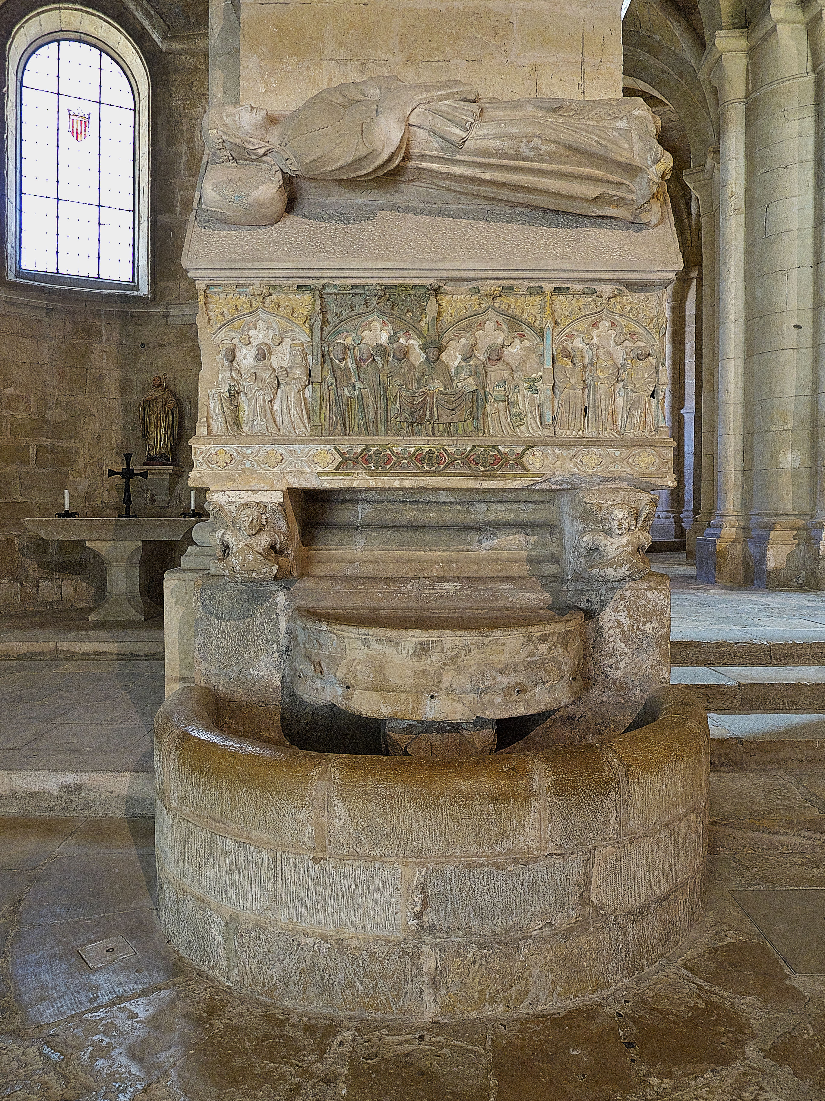 Iglesia del Monasterio de Poblet. Juana de Aragón (1344-1384) del Condado de Ampurias estuvo casada con Juan de Aragón "El Hermoso", XXVI Conde de Ampurias. Su sepulcro gótico, atribuído a Jorge de Dios, se localiza en la nave del Evangelio de la Abadía de Poblet.